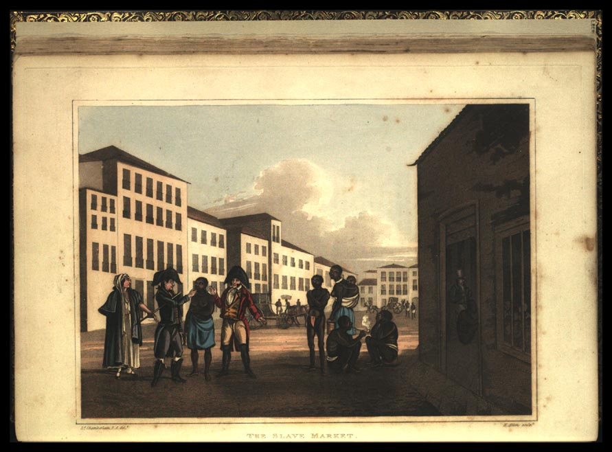 Mercado de escravos com homem e mulher brancos examinando negro. Outros sentados e em pé. À direita, prédio do mercado, dentro do qual se vêm alguns escravos